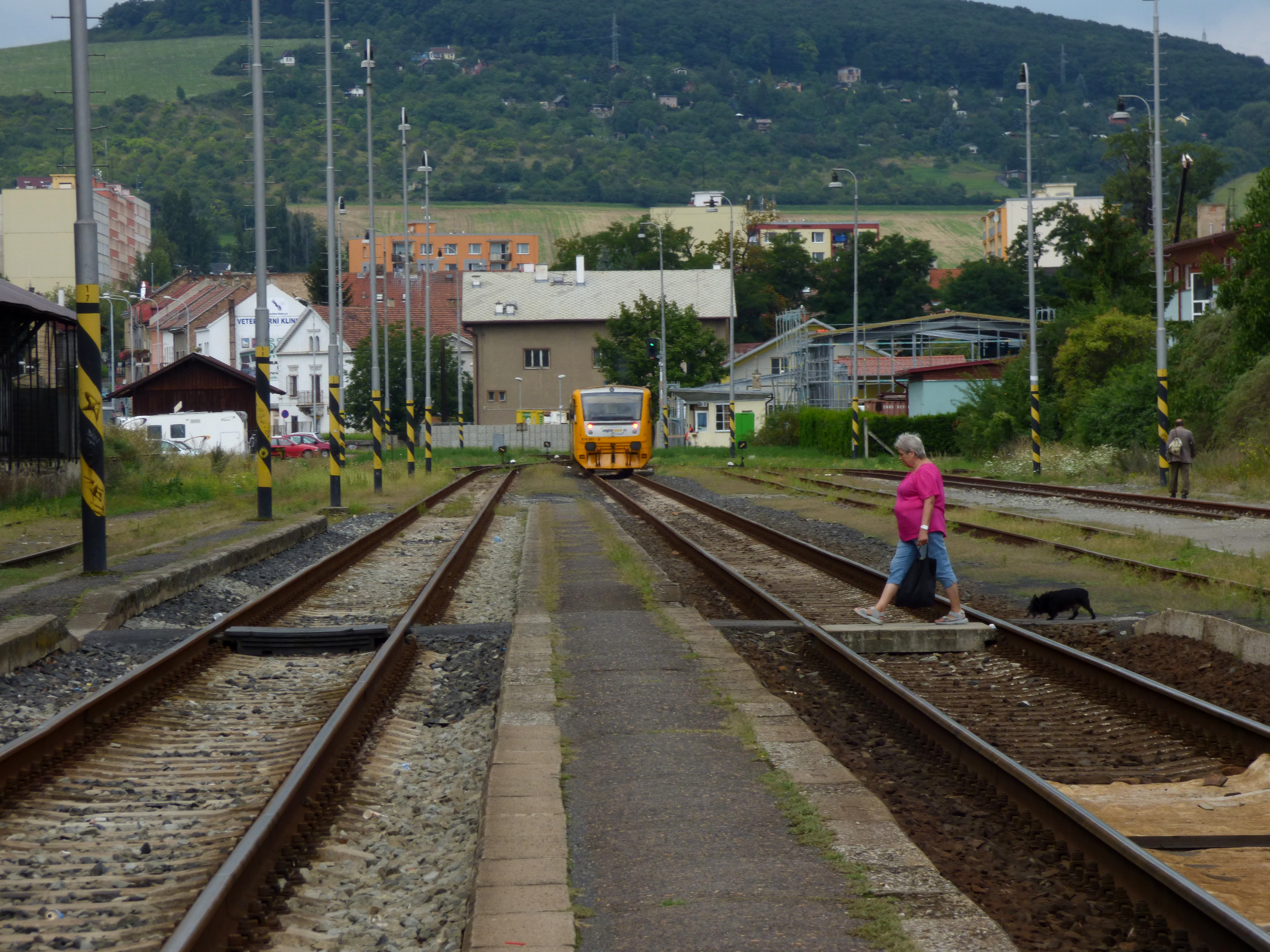 Litoměřice